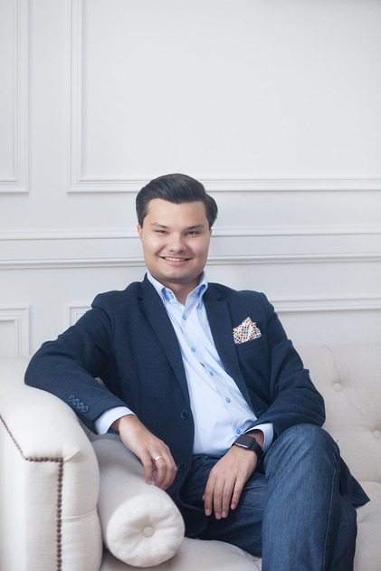 Мигель Паласио